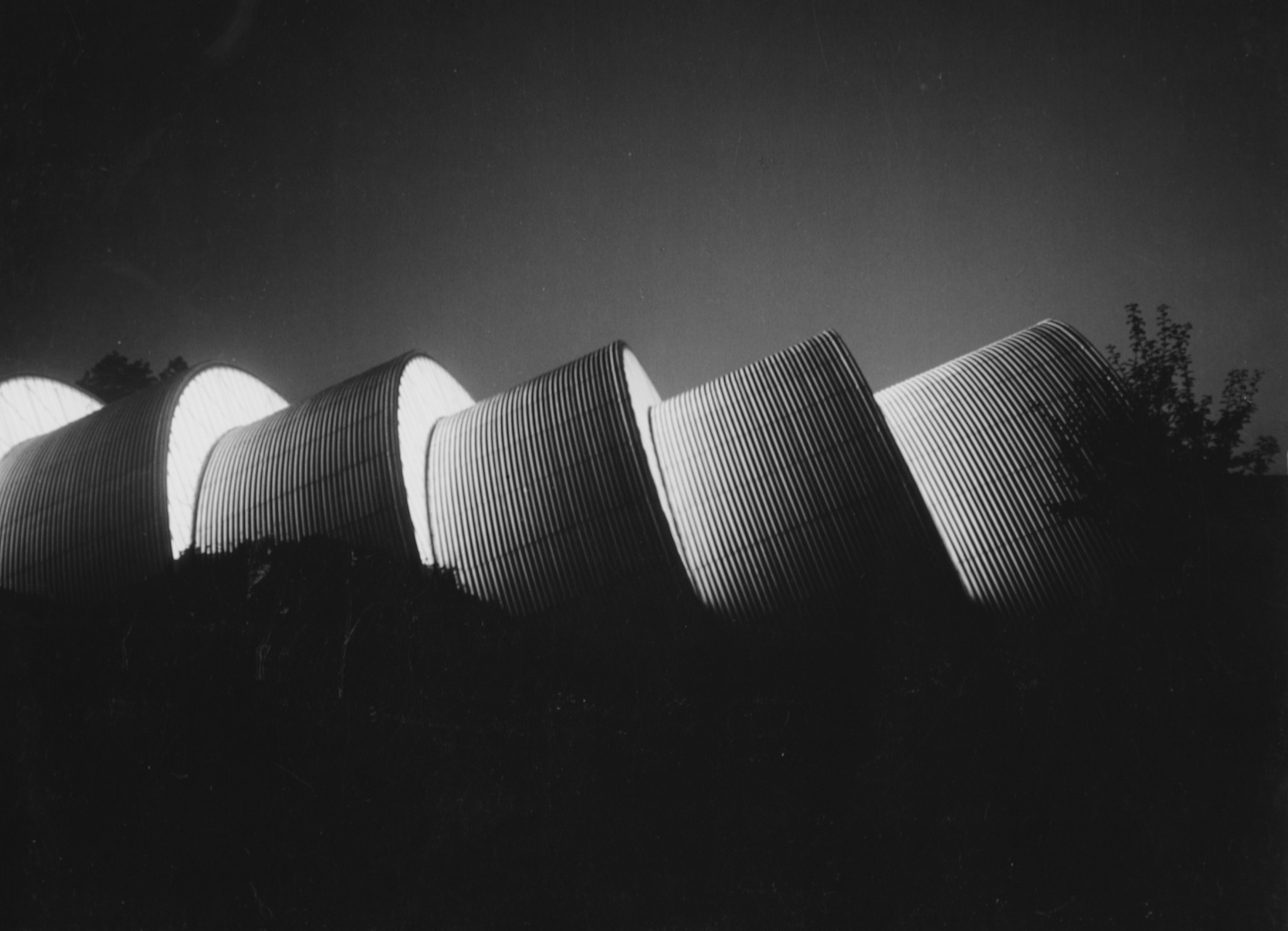 Ehemalige Gummibandweberei